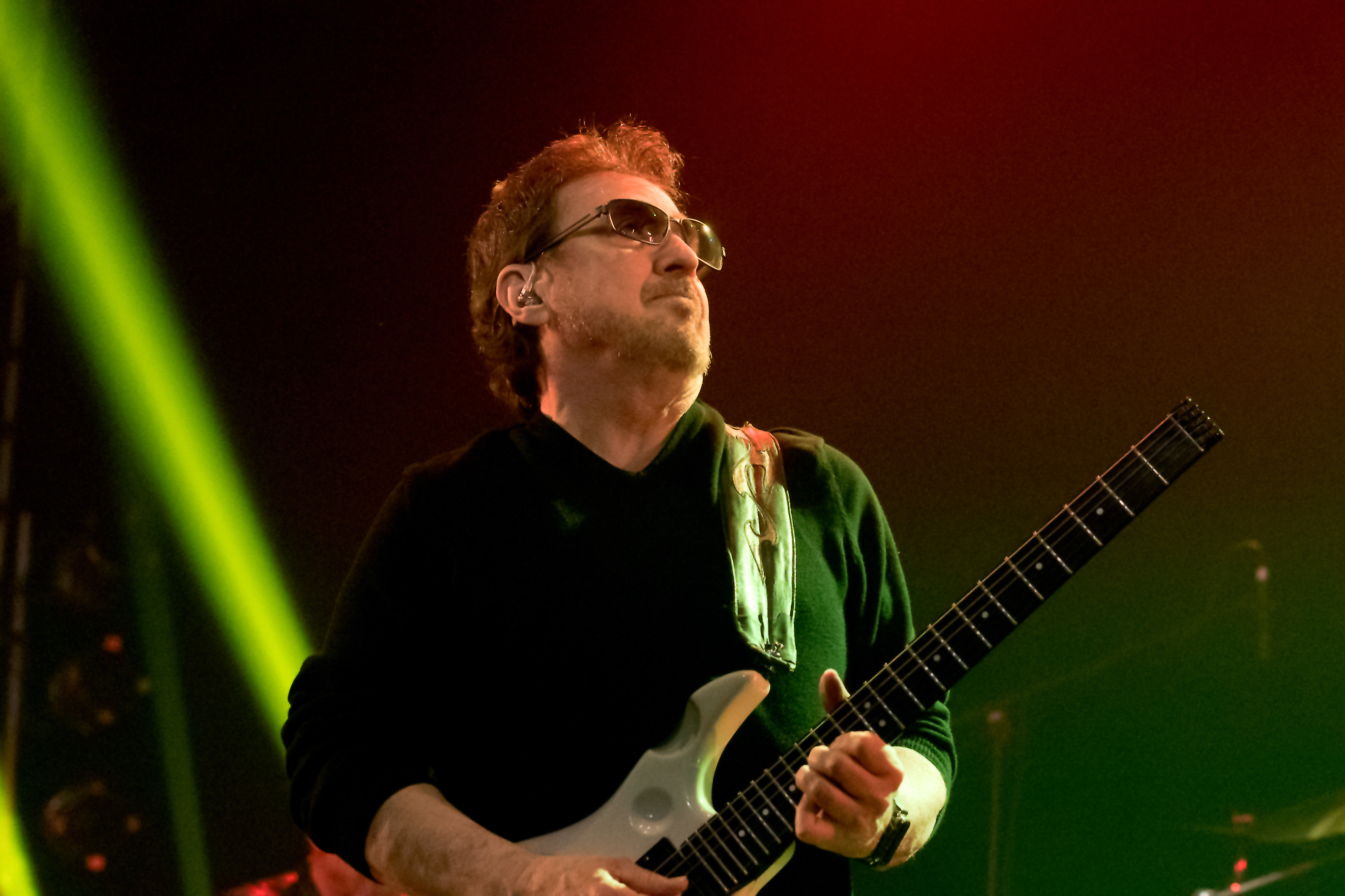 Blue Öyster Cult beim Wacken Open Air 2016